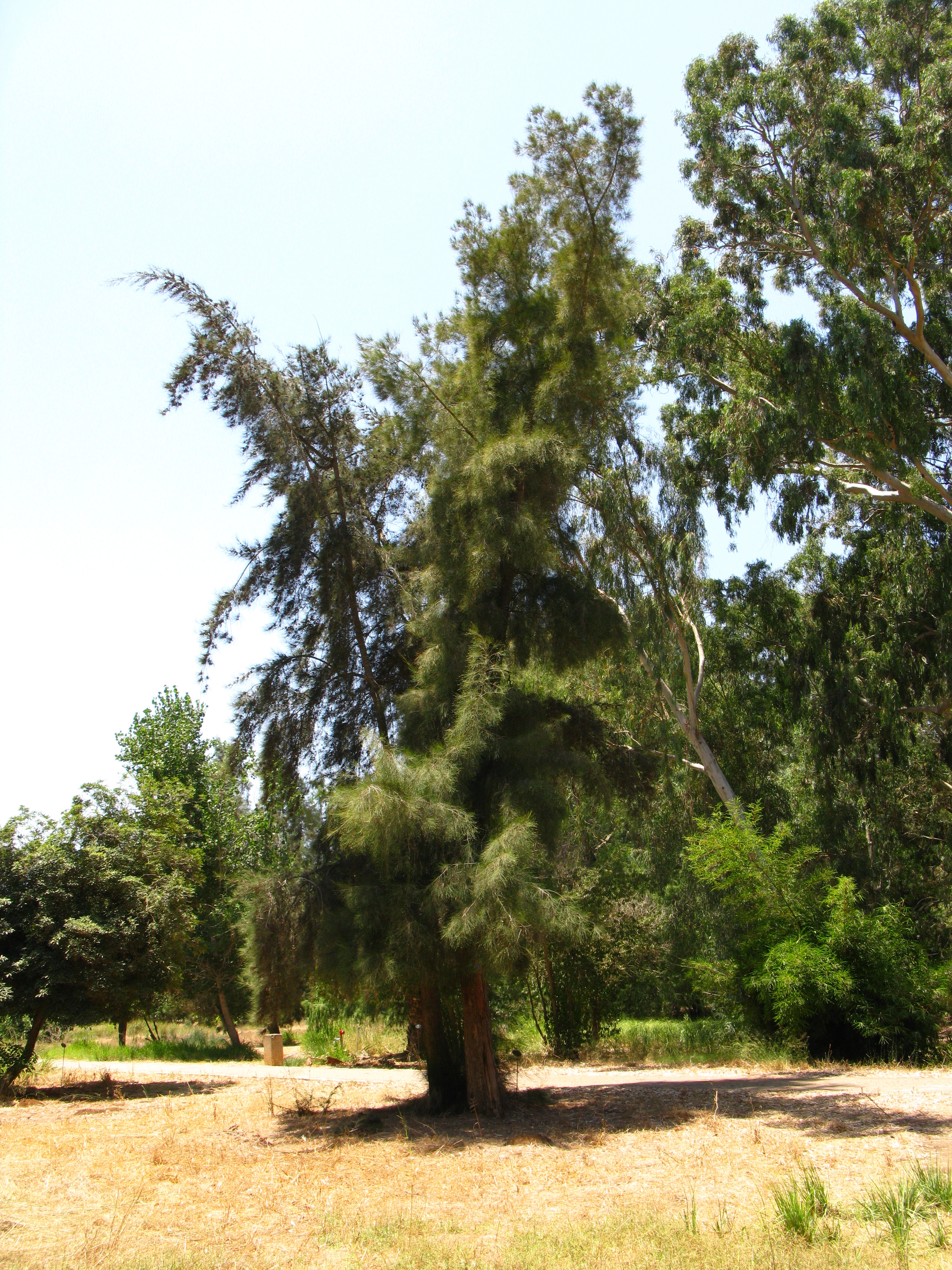 קזוארינה דקיקה ביער אילנות ישראל